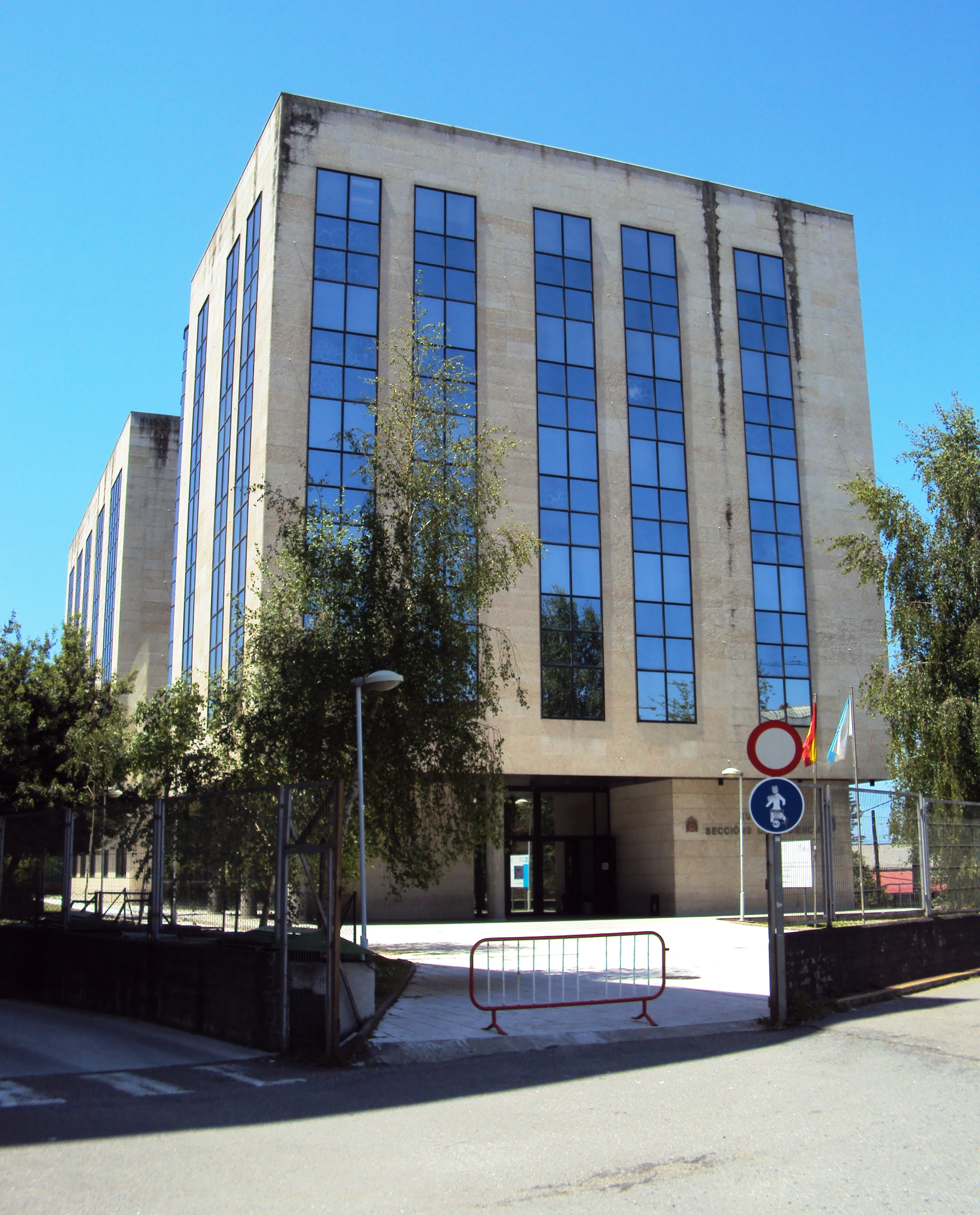 Edificio dos Xulgados de Vigo, Seccións da Audiencia